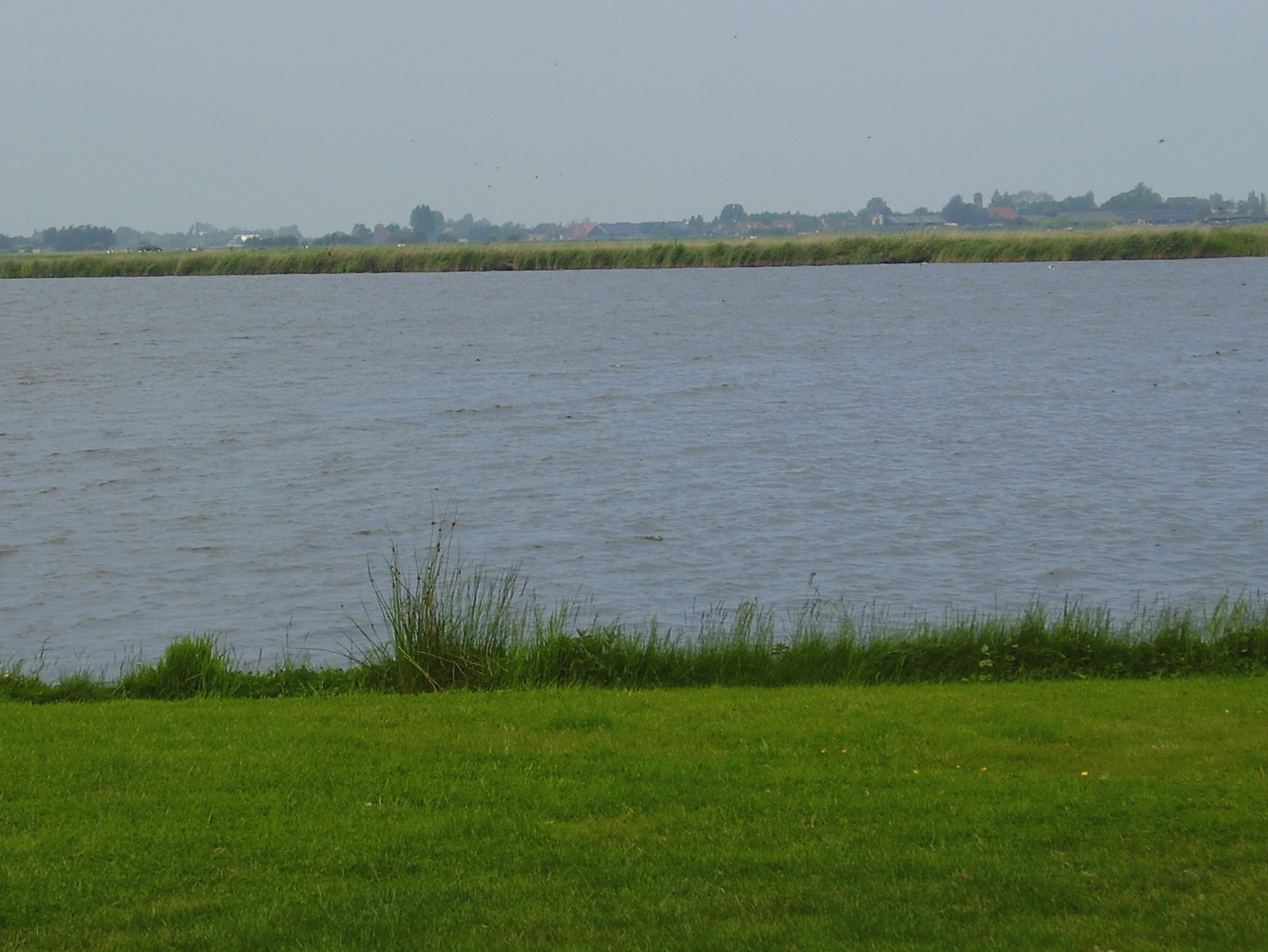 Het Wijd bij Langelille in provincie Friesland, Nederland